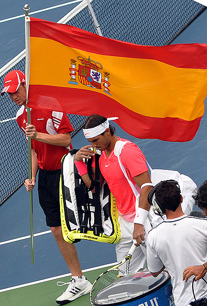 Rafa_0015